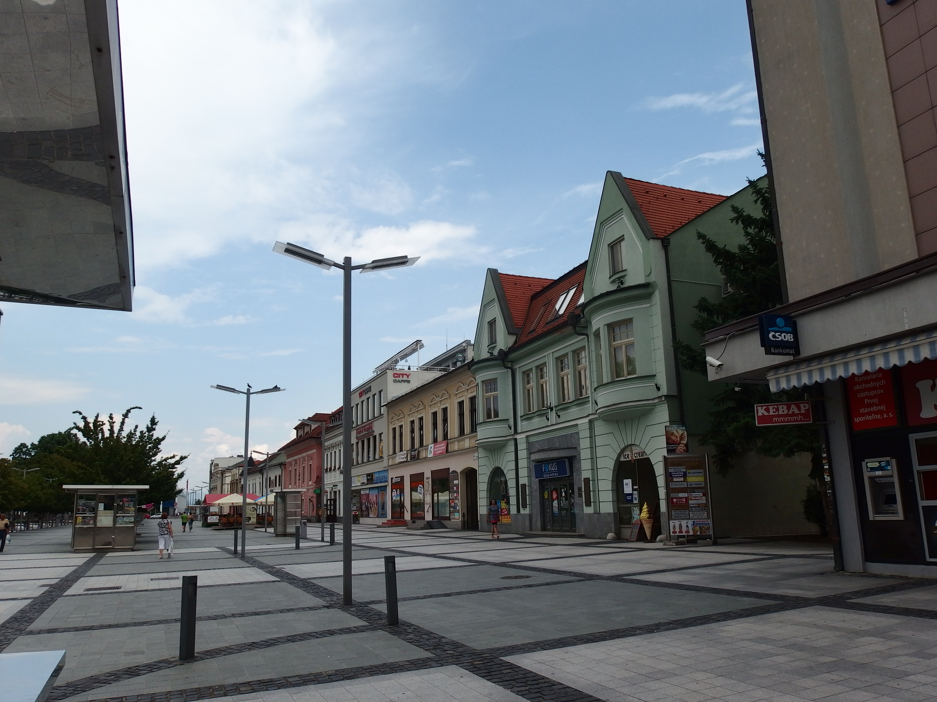 Zvolen, námestie SNP.